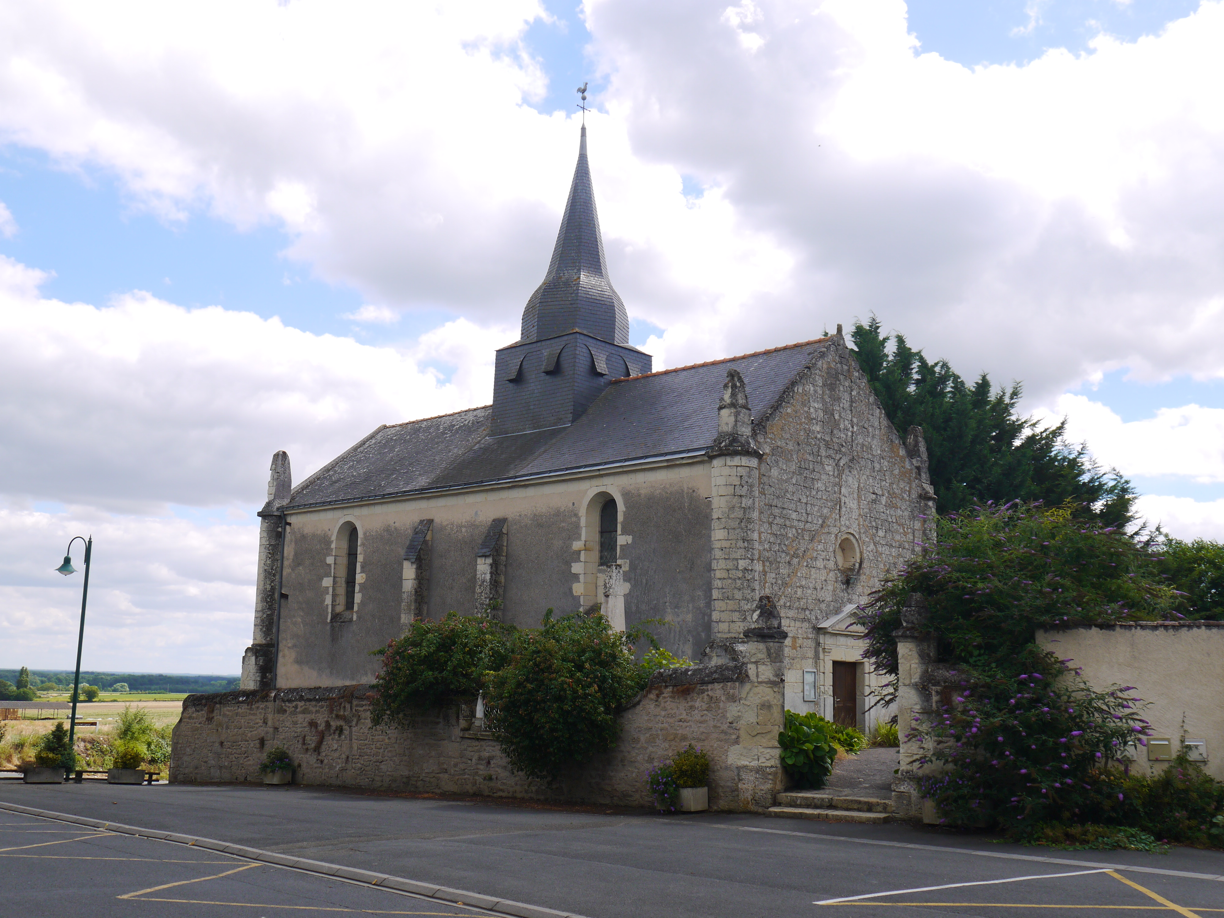 L'église.